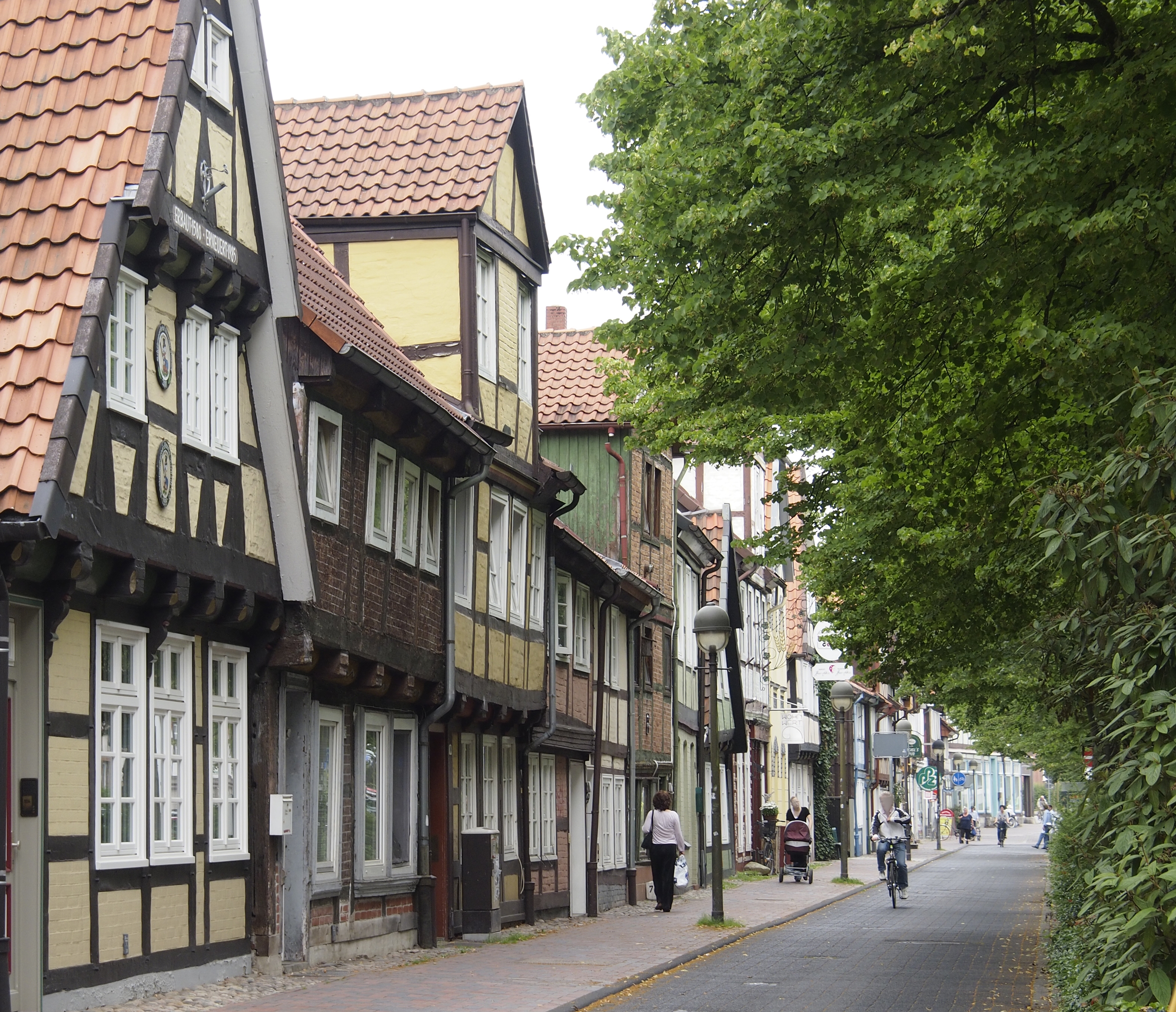 Fachwerkhäuser der Straße "Blumlage", in Celle